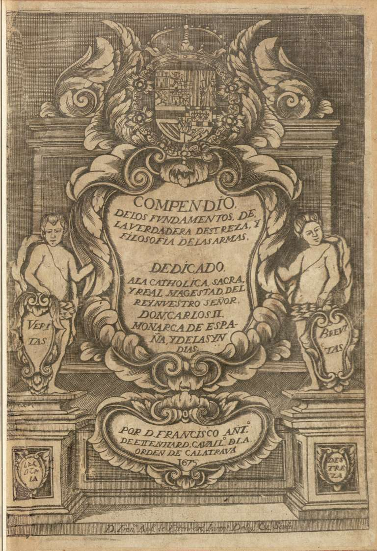 Portada calcográfica de Compendio de los fundamentos de la verdadera destreza y filosofía de las armas, Madrid, Antonio de Zafra, 1675